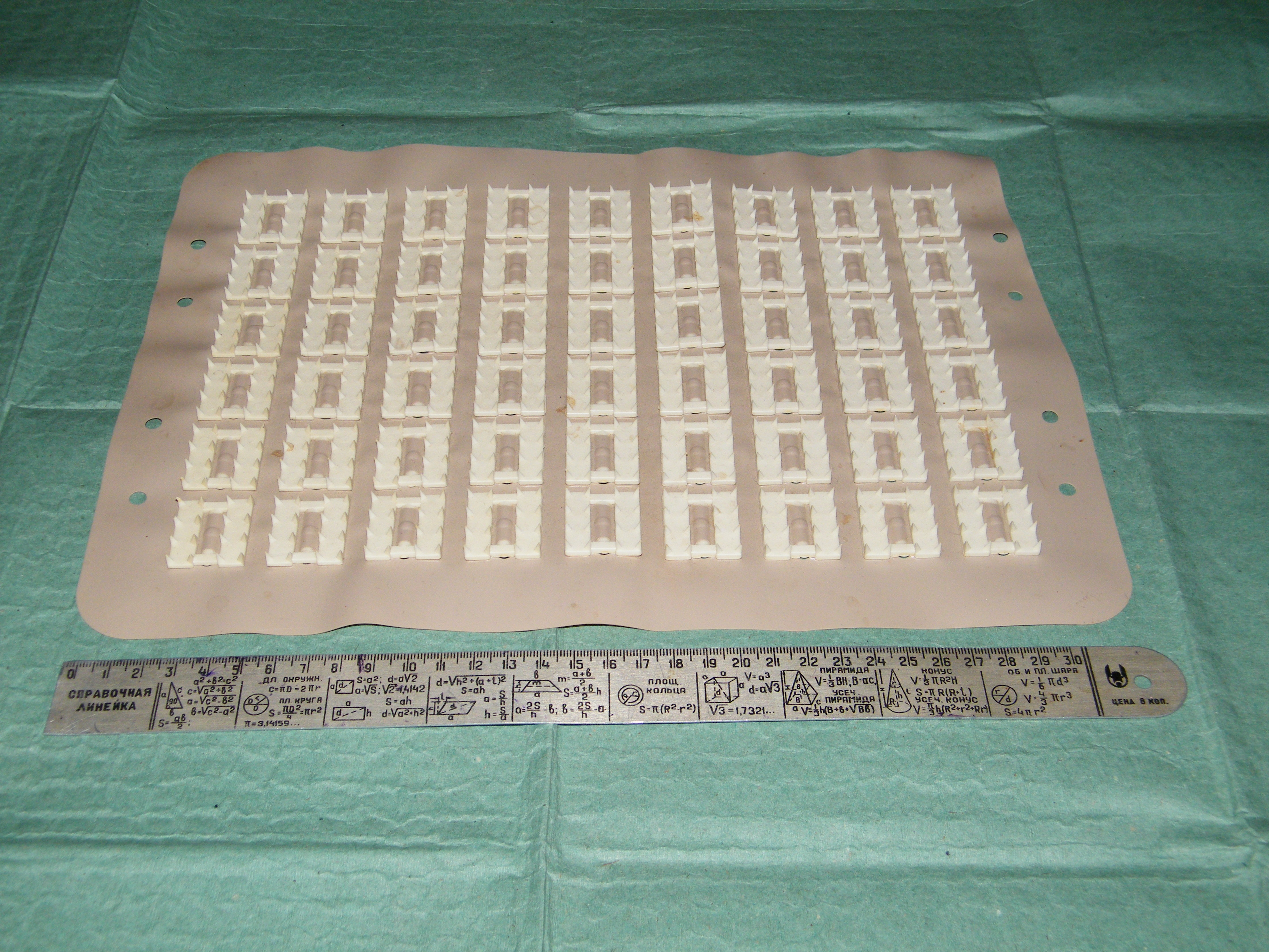 Ипликатор Кузнецова. Благодаря ипликатору Кузнецова мой домашний кот не спит на клавиатуре компьютера.